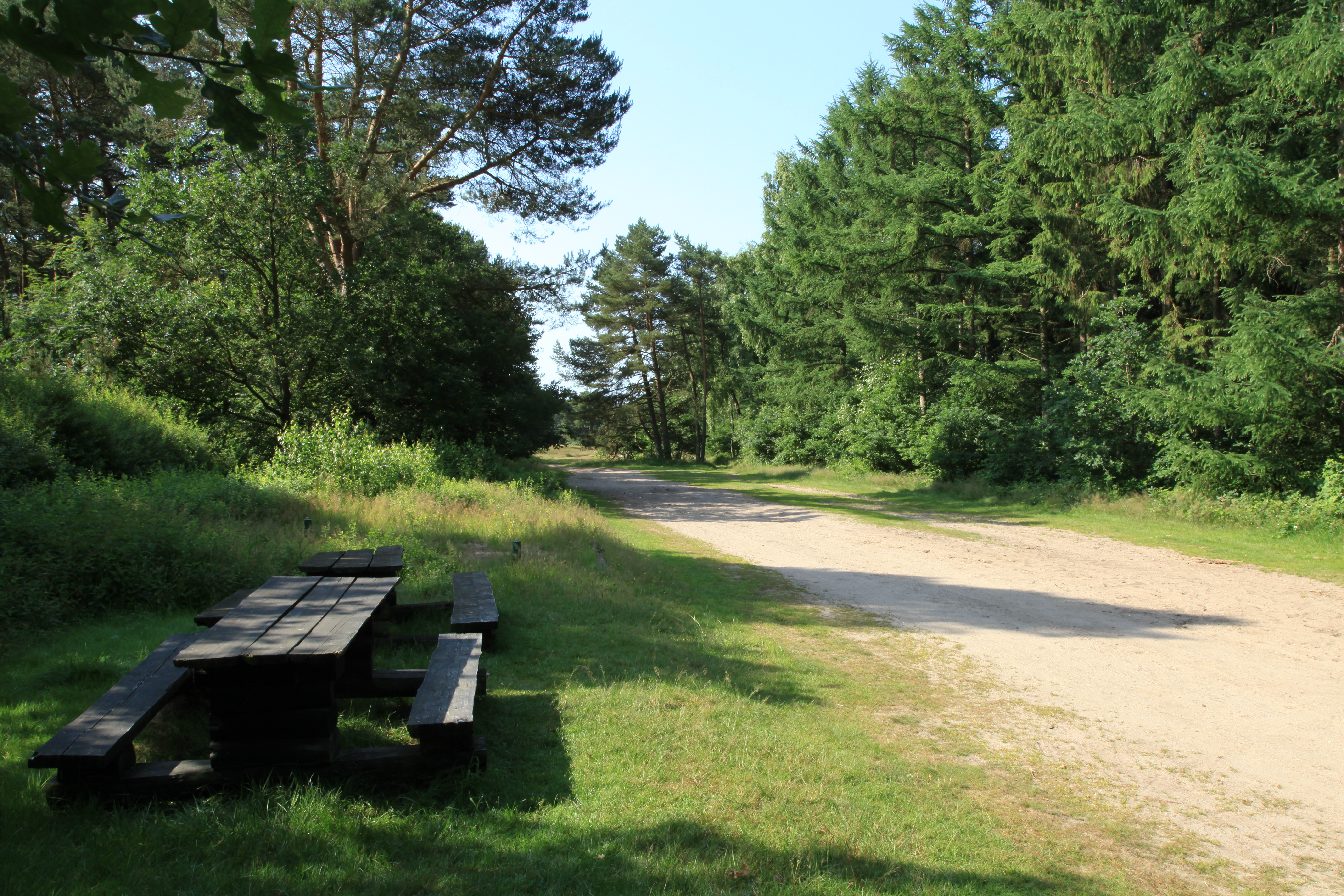 Ochsenweg auf der Grenze von Tetenhusen und Owschlag